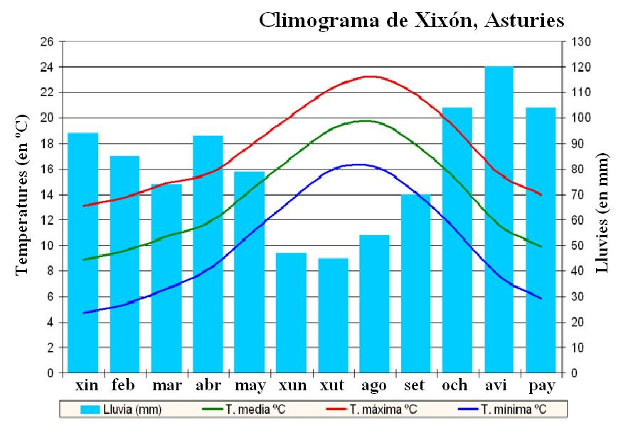 climograma de la ciudá de xixón